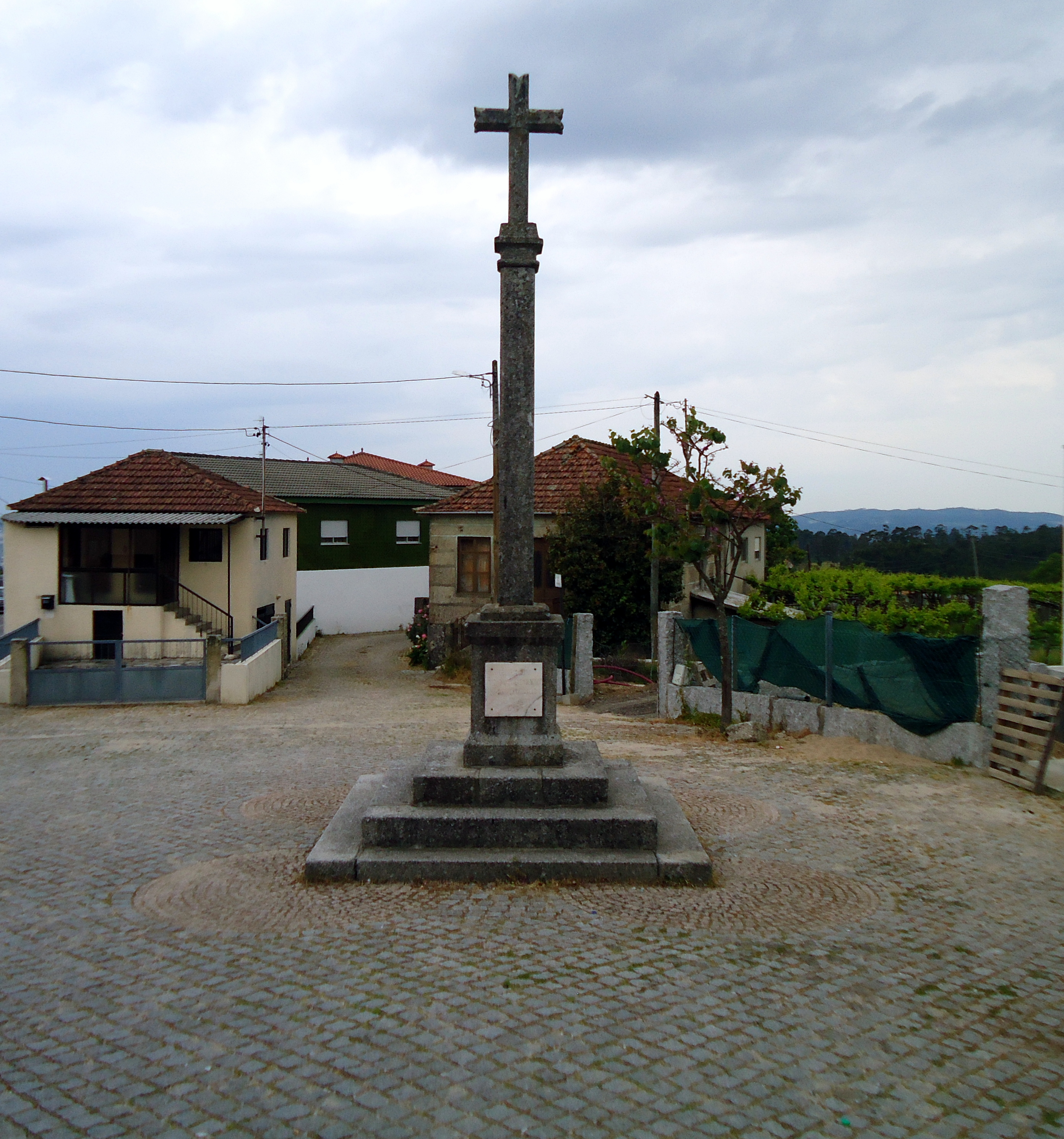 Felgueiras Pinheiro Cruzeiro